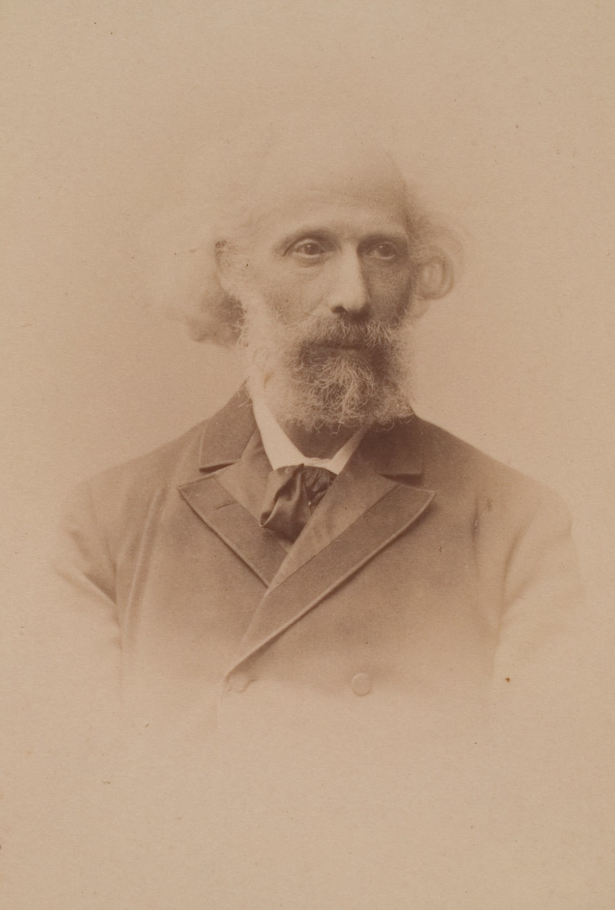 Salomon Lefmann, Sprachwissenschaftler, 1870–1912 Professor für Sanskrit in Heidelberg